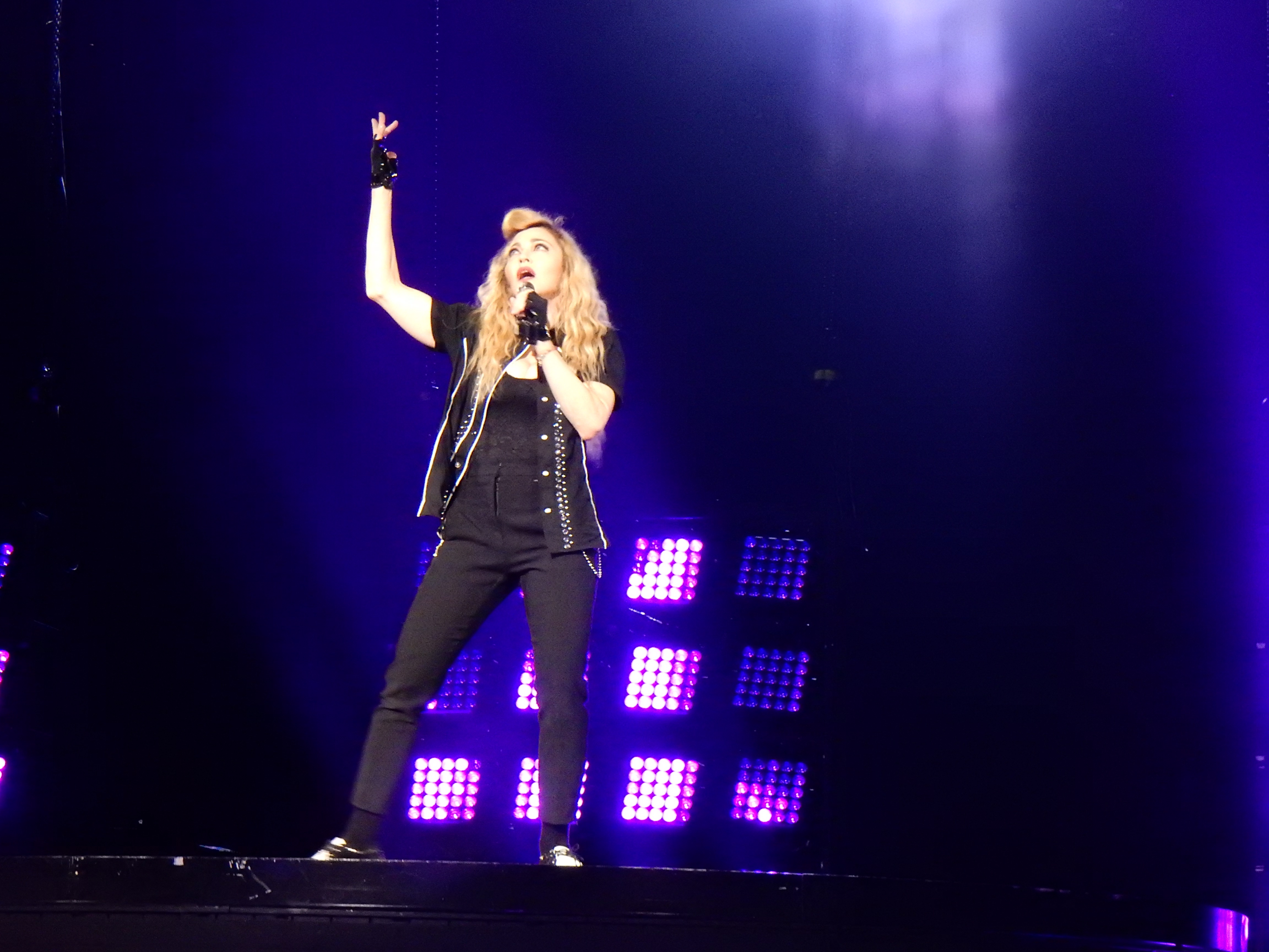 Madonna - Rebel Heart Tour Cologne 2